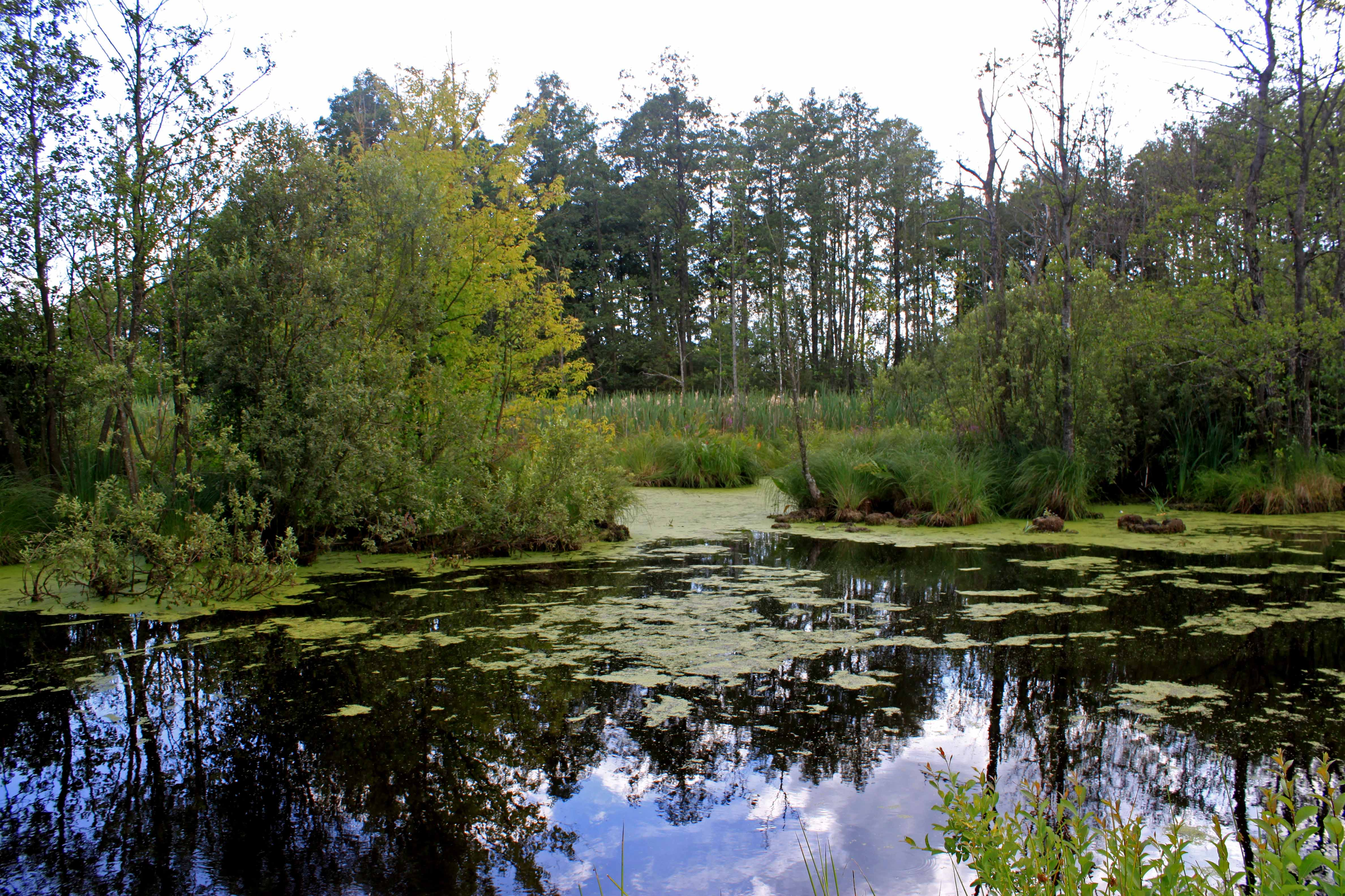 Шацький національний природний парк